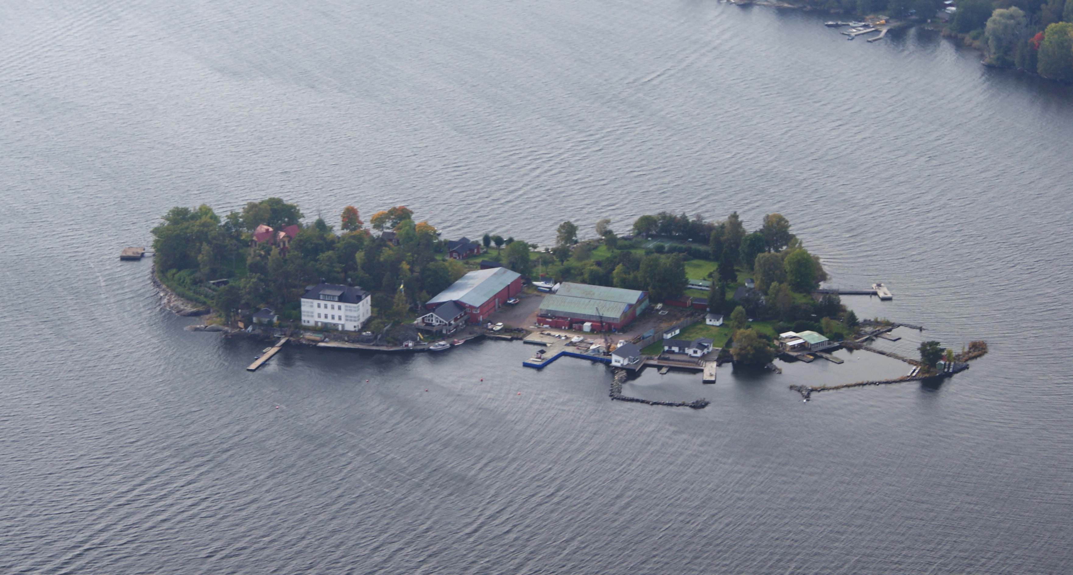 Duvholmen sedd från helikopter.